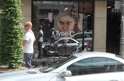 Schaufenster in Deutschland